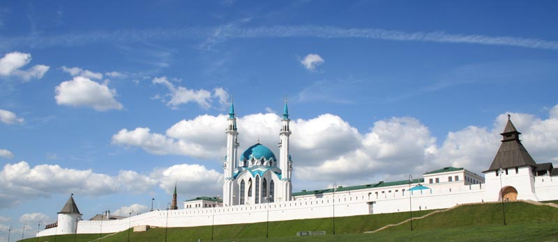 Kul Sharif mosque, Kazan Kremlin